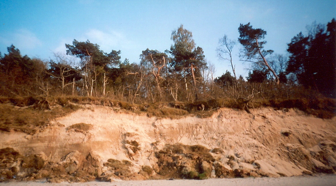 Lasy na klifie w okolicach Niechorza